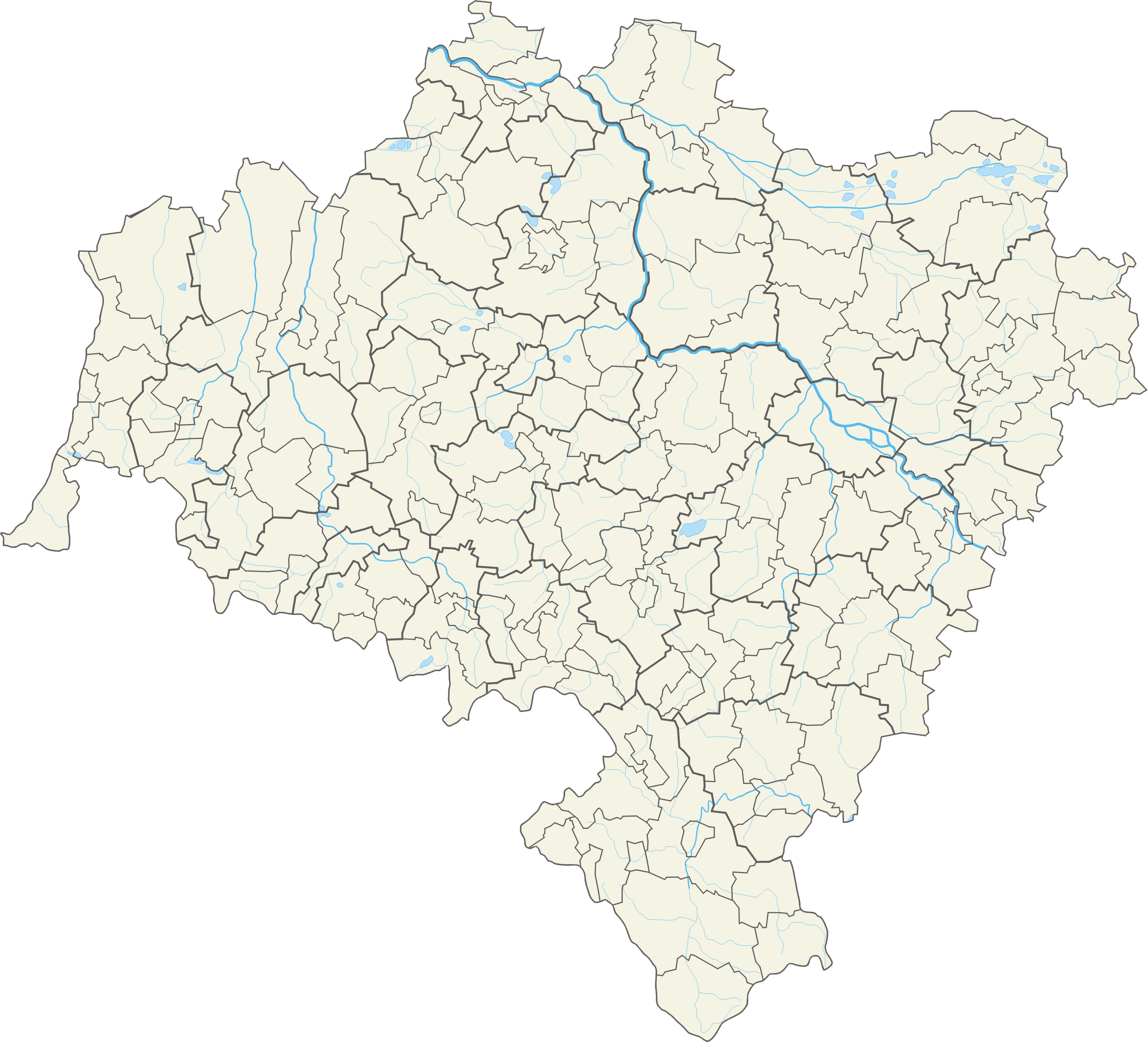 Województwo dolnośląskie – powiaty i gminy Współrzędne graniczne mapy: N: 51.8047° N S: 50.0963° N W: 14.8175° E E: 17.7954° E